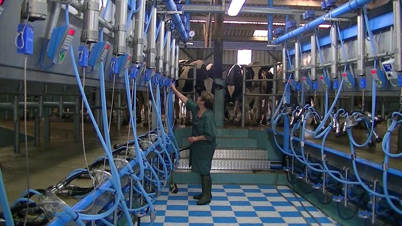 épi